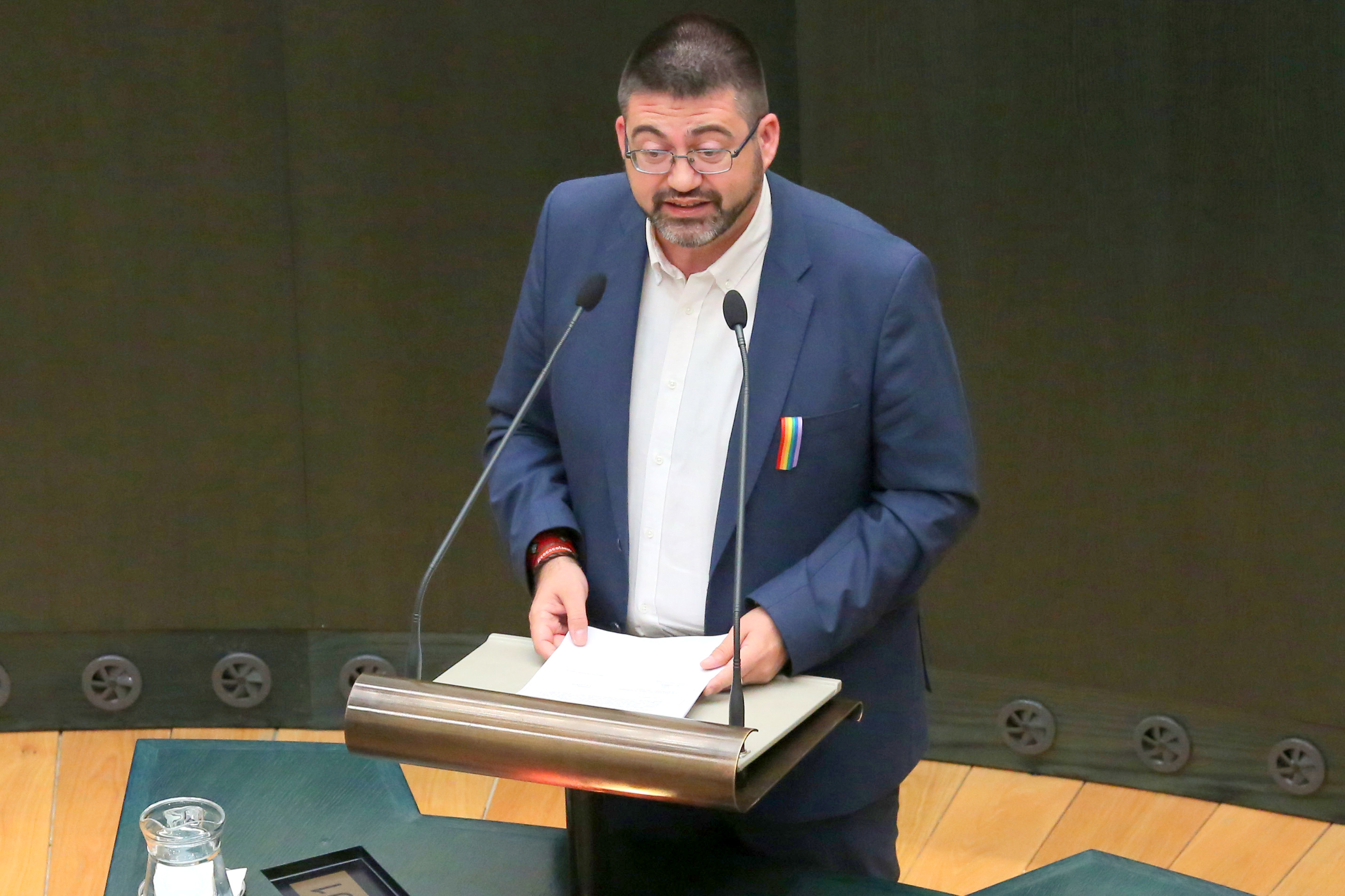 Una nueva tasa gravará el uso del espacio público por parte de las empresas de telefonía fija tras la aprobación en el Pleno municipal. Se cumple así con la legislación comunitaria y se da cumplimiento a sentencias judiciales.